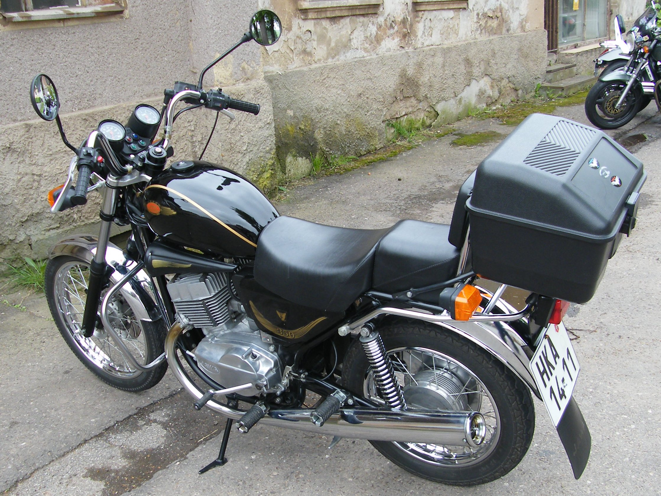 Jawa 350 (2000)